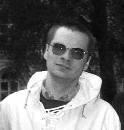 Wiesław Bieliński. 1988 r.